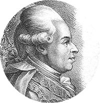 Elis Schröderheim (1747-1795)